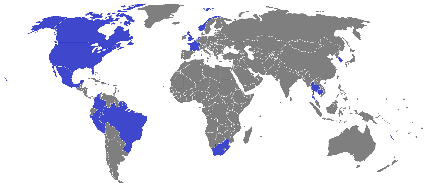 Pays visités au cours de l'émission Martin Weill.